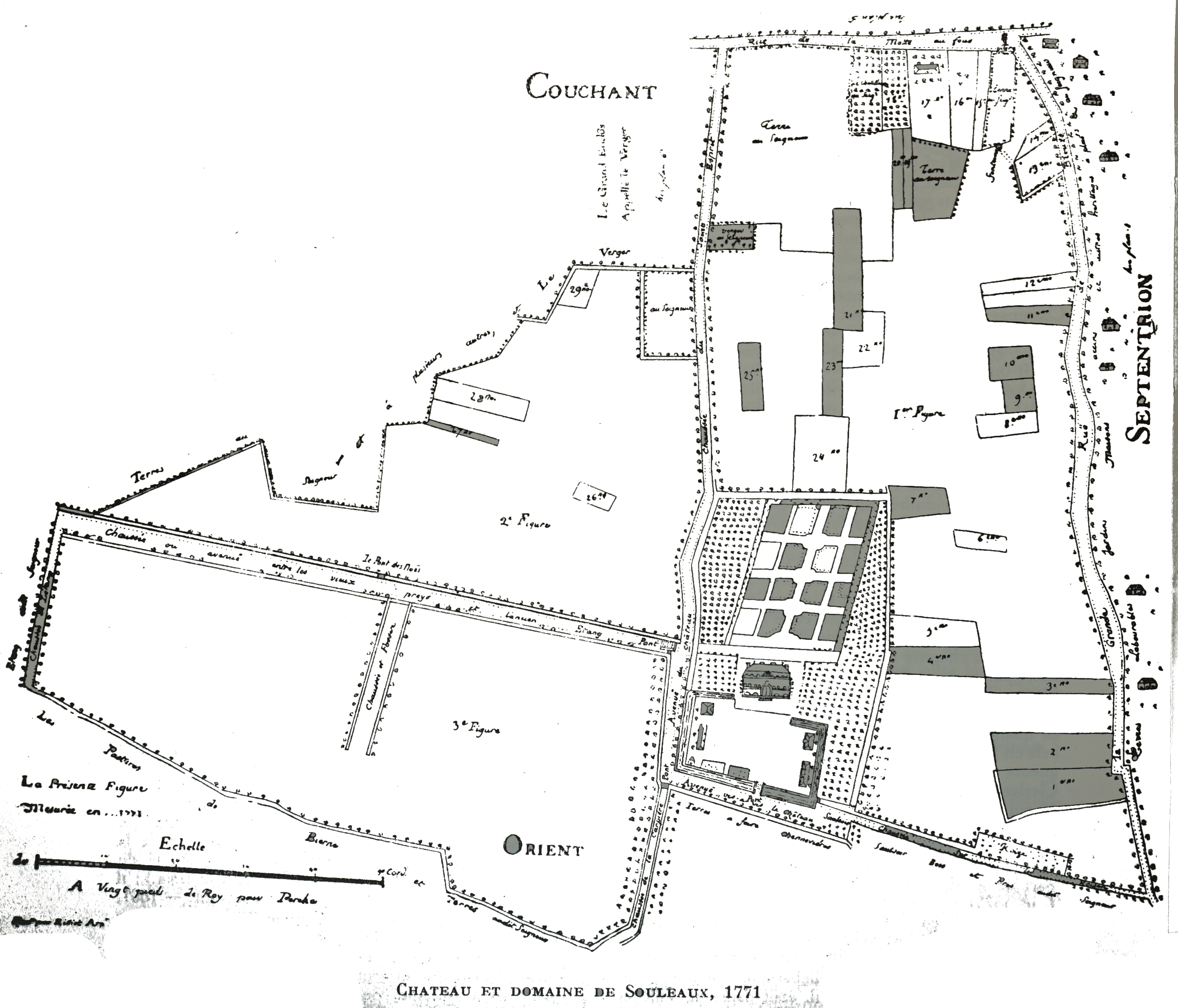 image du château de Souleaux.